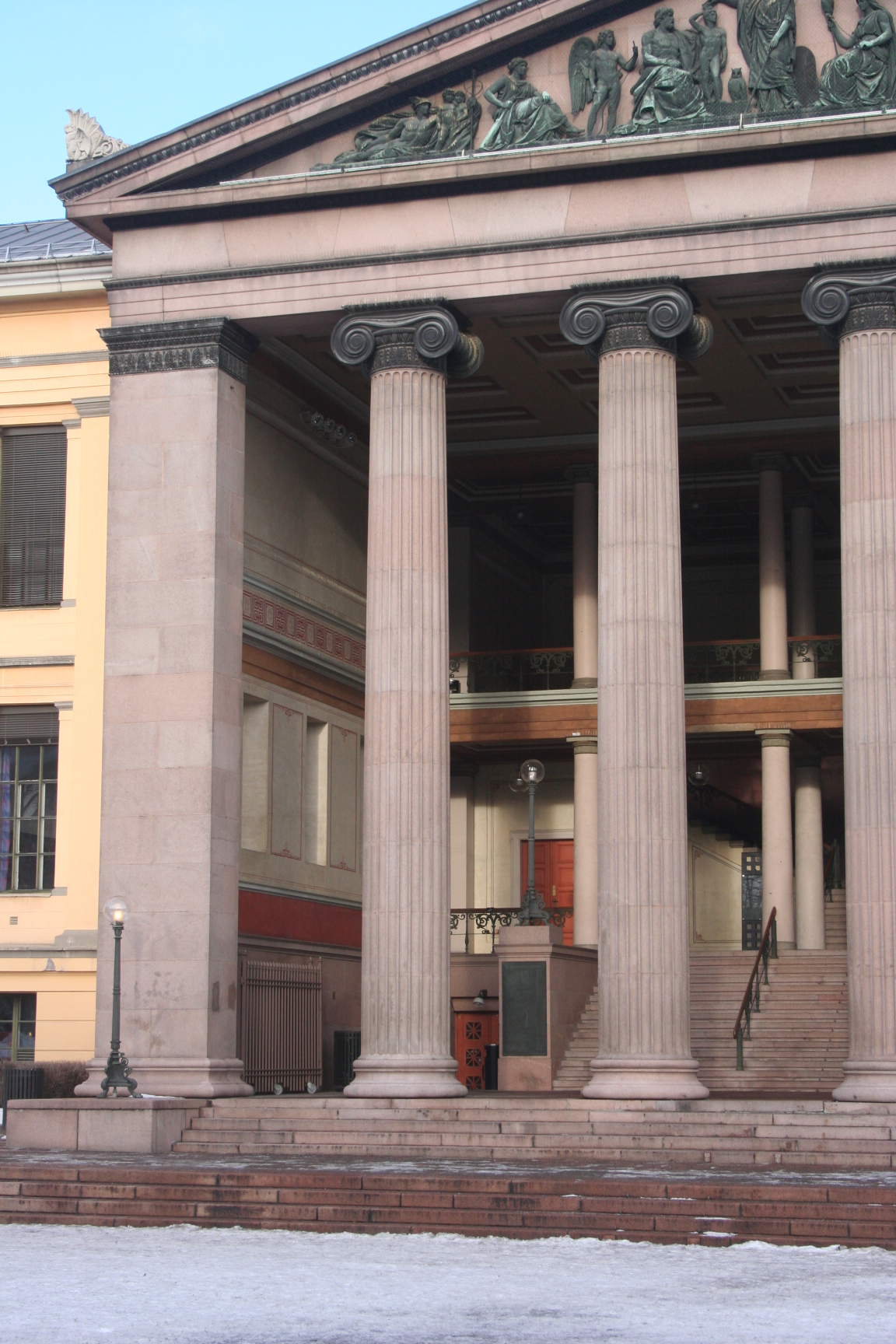 Domus Media, Hauptgebäude der Universität Oslo